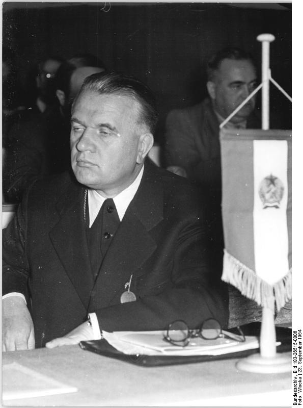 Zentralbild-TBD-Wlocka 2462 Zi-Ho. 10 Motive 23.9.1954 7. Parteitag der CDU in Weimar - 21. bis 25.9.1954 Am Mittwoch, den 22.9.1954, wurde in der Weimarhalle in Weimar, der 7. Parteitag der CDU unter Teilnahme zahlreicher Delegationen aus den volksdemokratischen Ländern und dem kapitalistischen Ausland eröffnet. UBz: Bischof Lajos Vetö aus der Volksrepublik Ungarn.